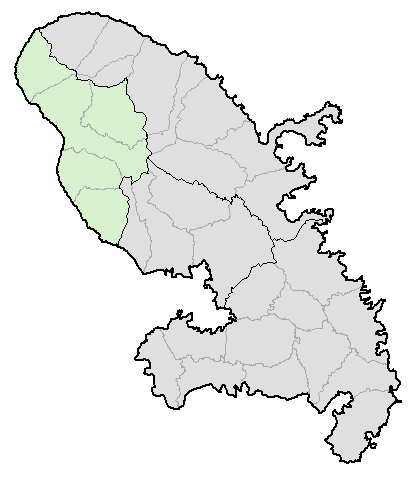 Carte de la Martinique avec l'arrondissement de Saint-Pierre en couleur. Map of French department of Martinique with Saint-Pierre "arrondissement" in color.